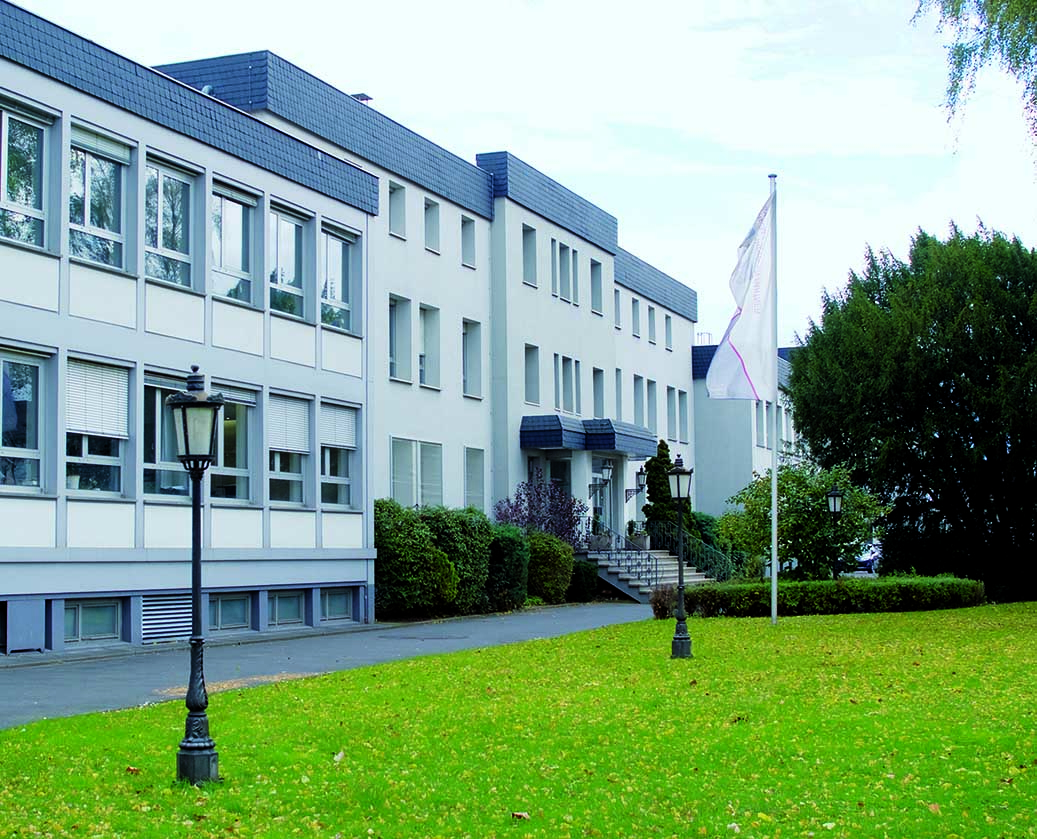 W+D Facility Neuwied